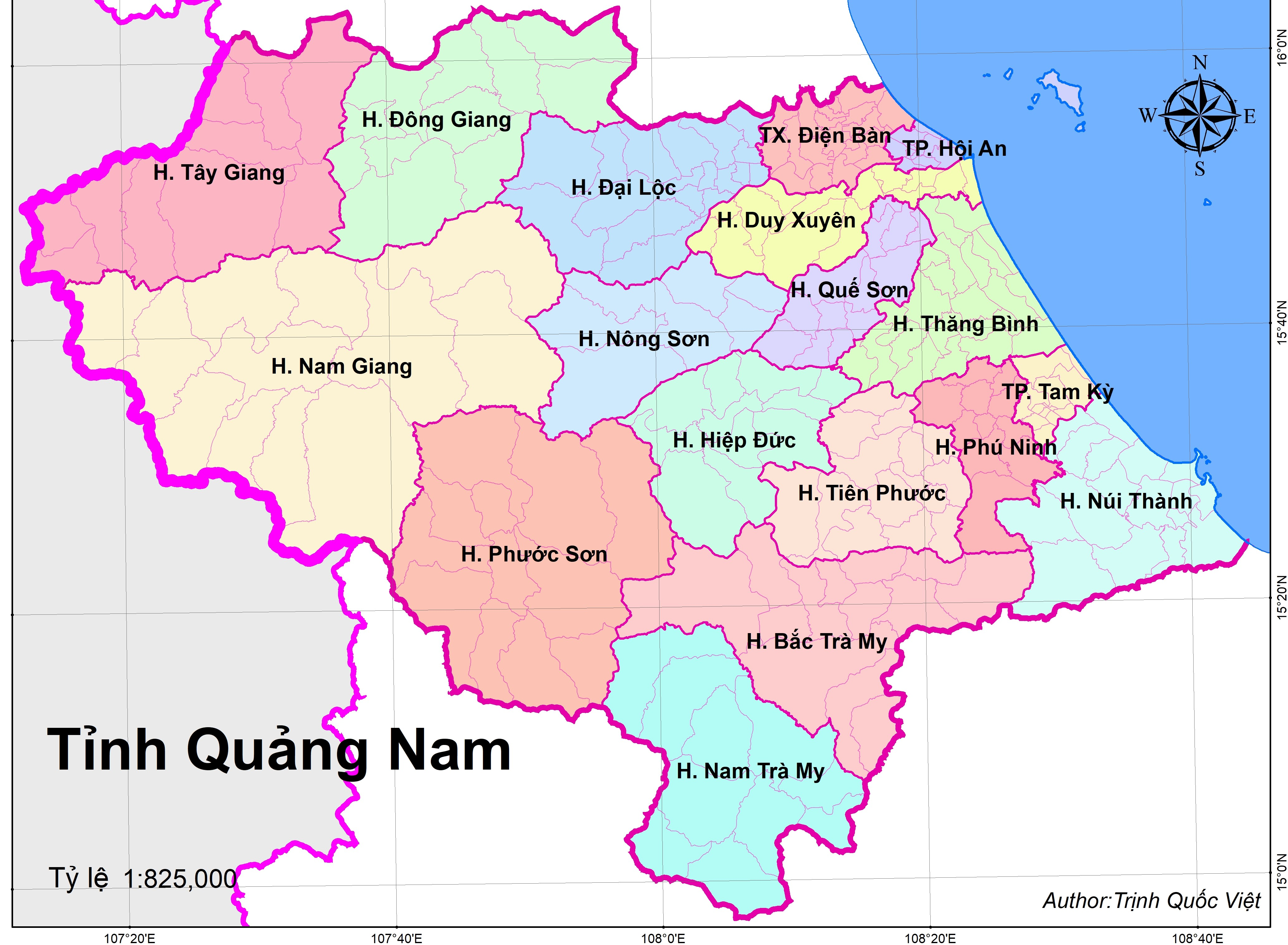 Bản đồ hành chính năm 2020